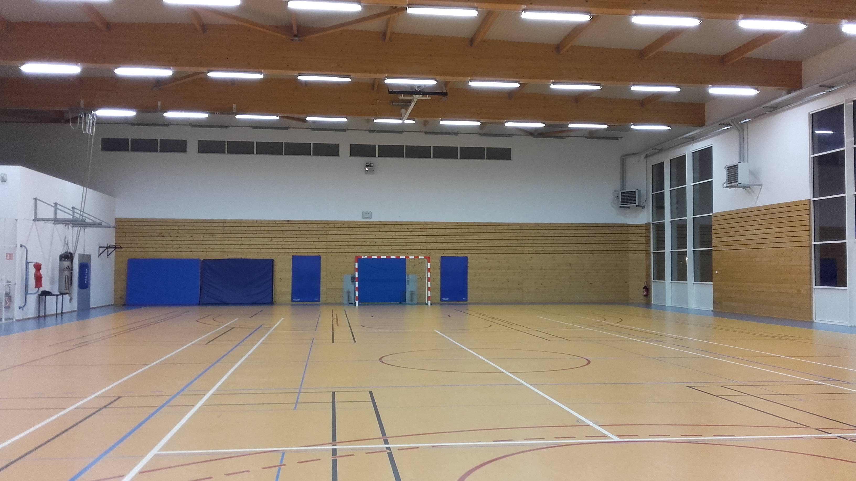 Photo de l'intérieur du gymnase de la Gendarmerie de Sathonay-Camp